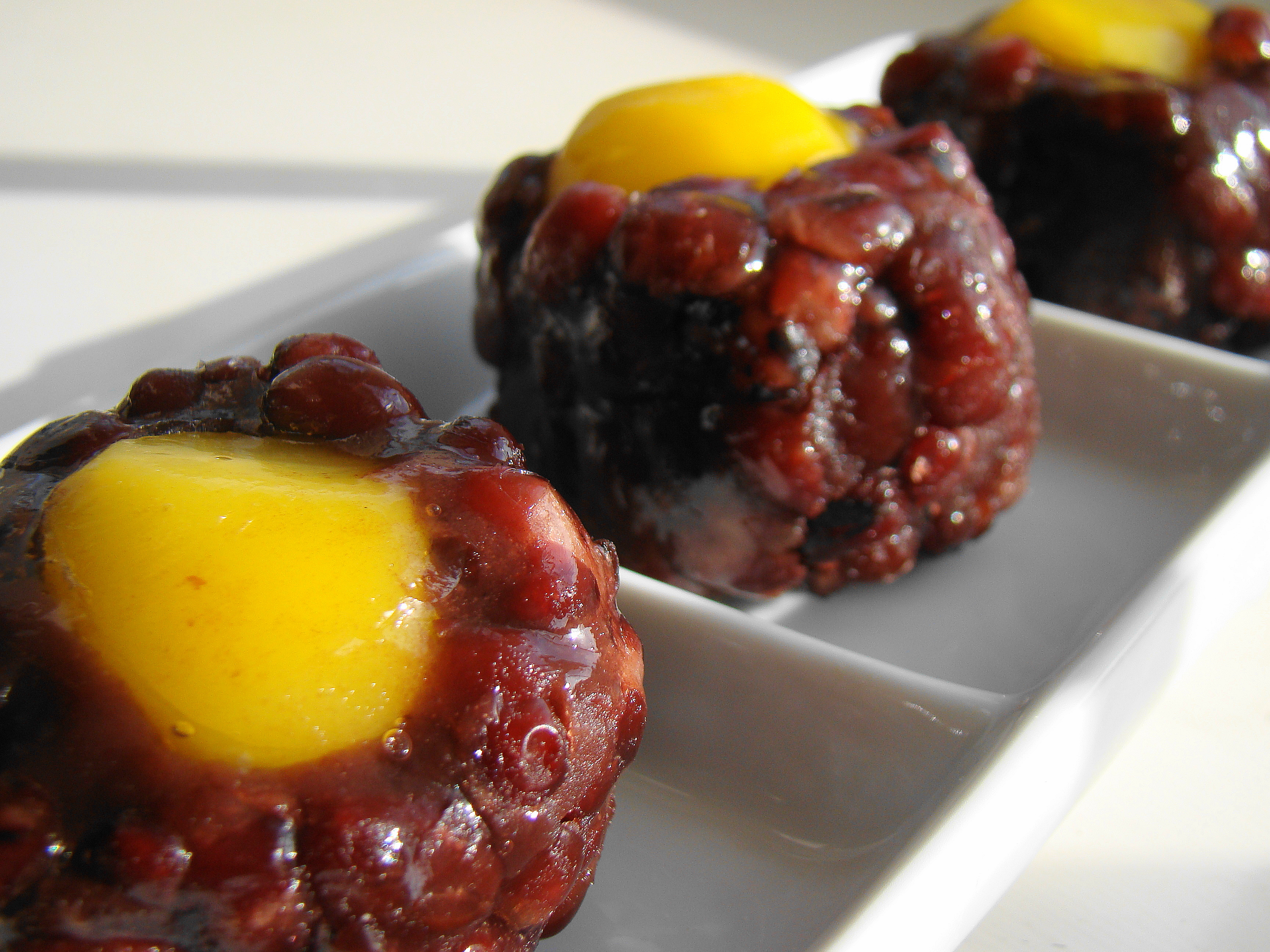 Sweet Azuki Bean desert